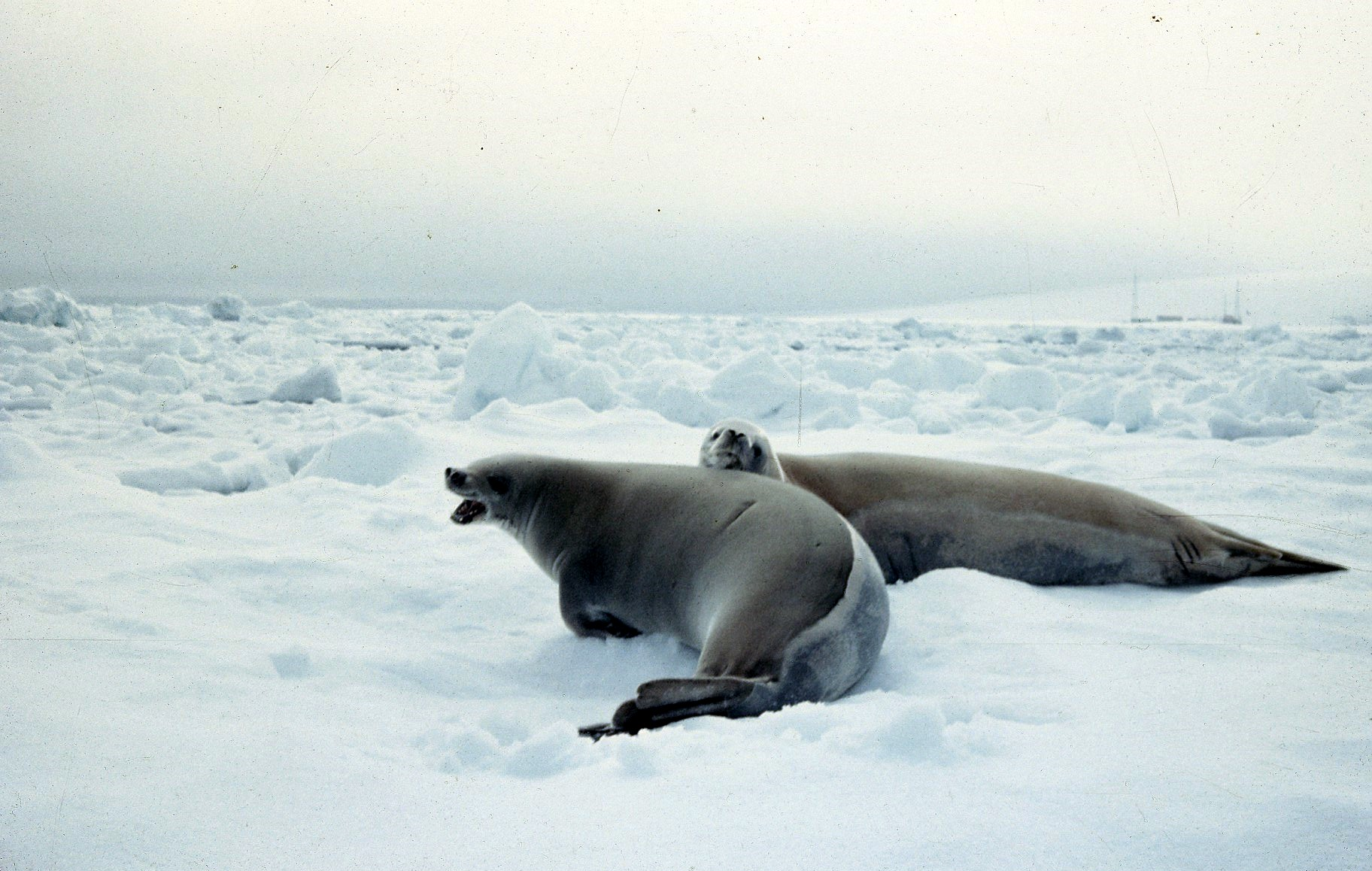 Par de focas descansando sobre el brush ice en puerto Soberanía - Bahía Chile. Al fondo se divisa la Base Arturo Prat de la Armada de Chile.